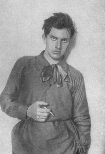 Ученик Строгановского училища. Москва.